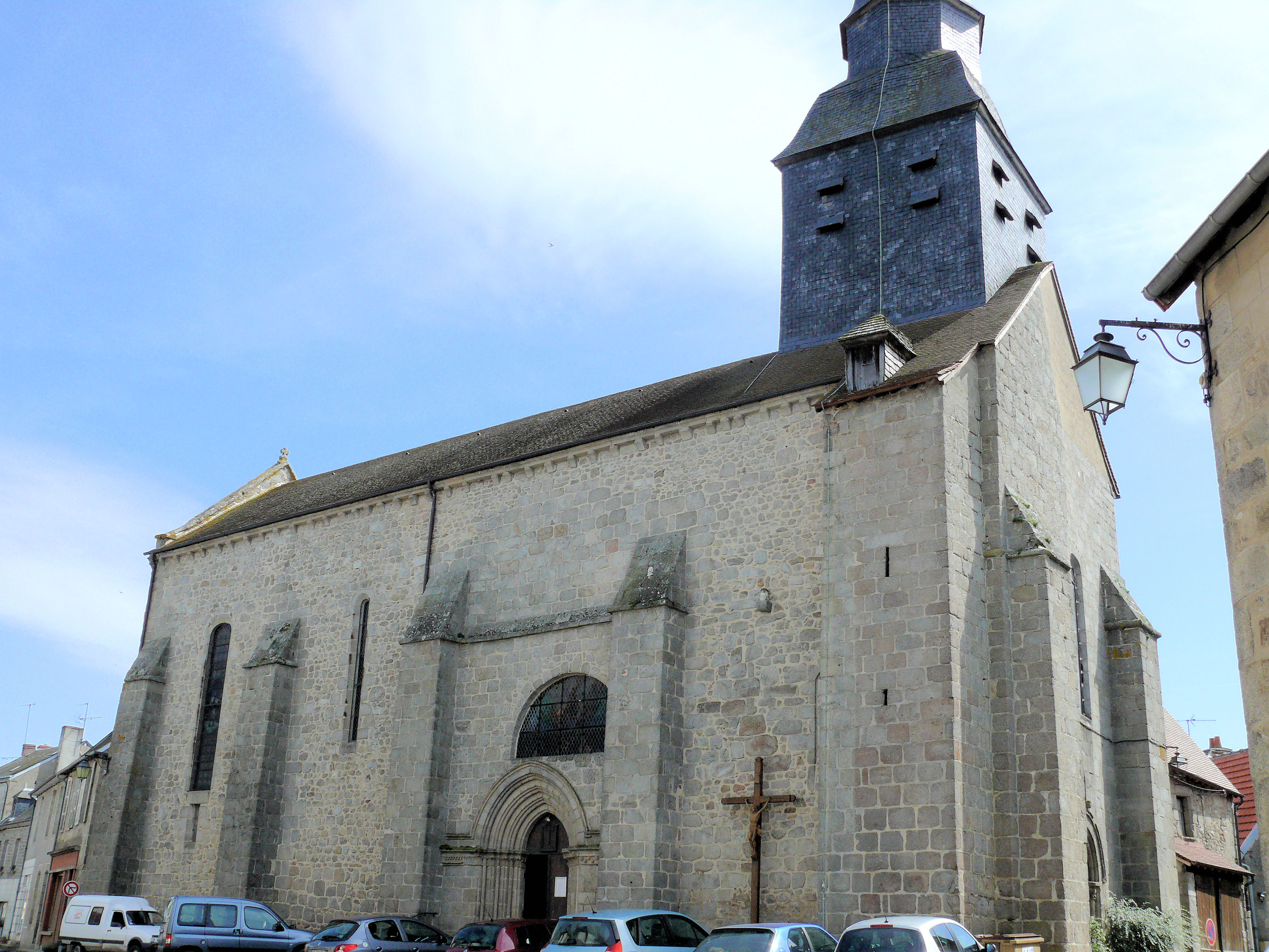 Chénérailles - Église Saint-Barthélémy - Ensemble